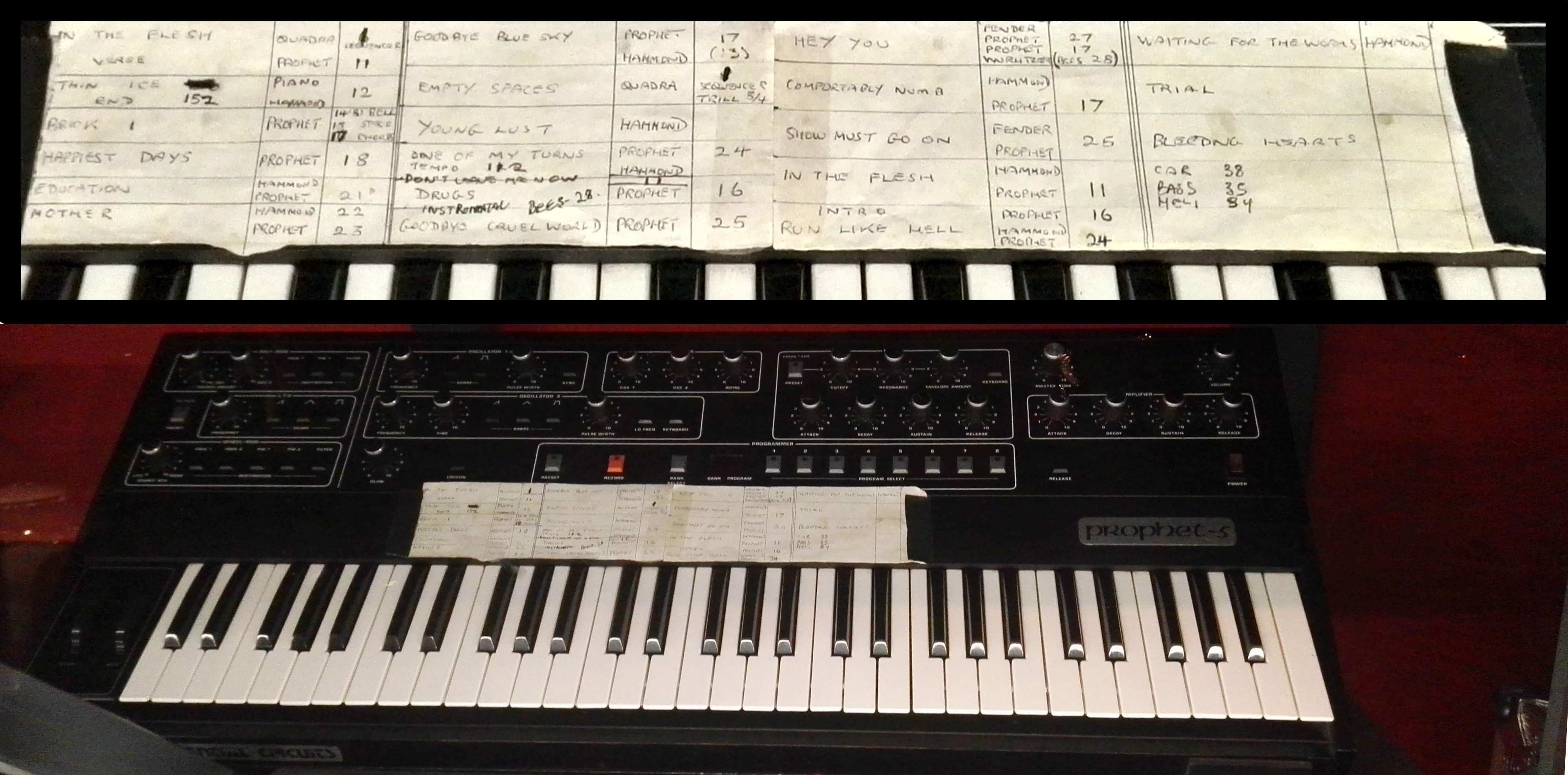 Il sintetizzatore analogico Prophet 5 utilizzato in tournee da Wright nel 1980. Sono leggibili le note delle impostazioni per i vari brani scritte a mano dallo stesso Wright.